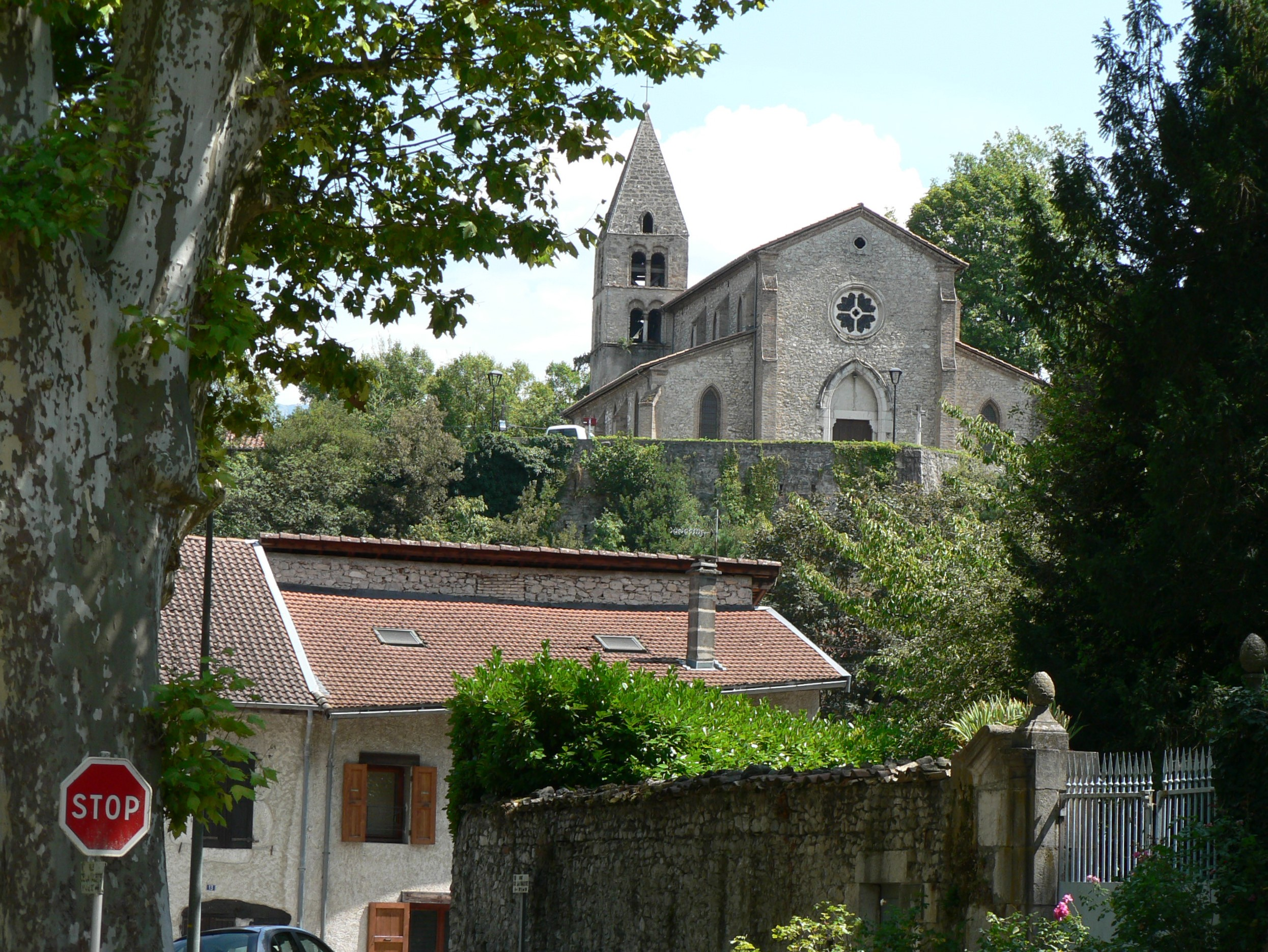 Varces. Varces-Allières-Risset, Isère, AuRA, France.